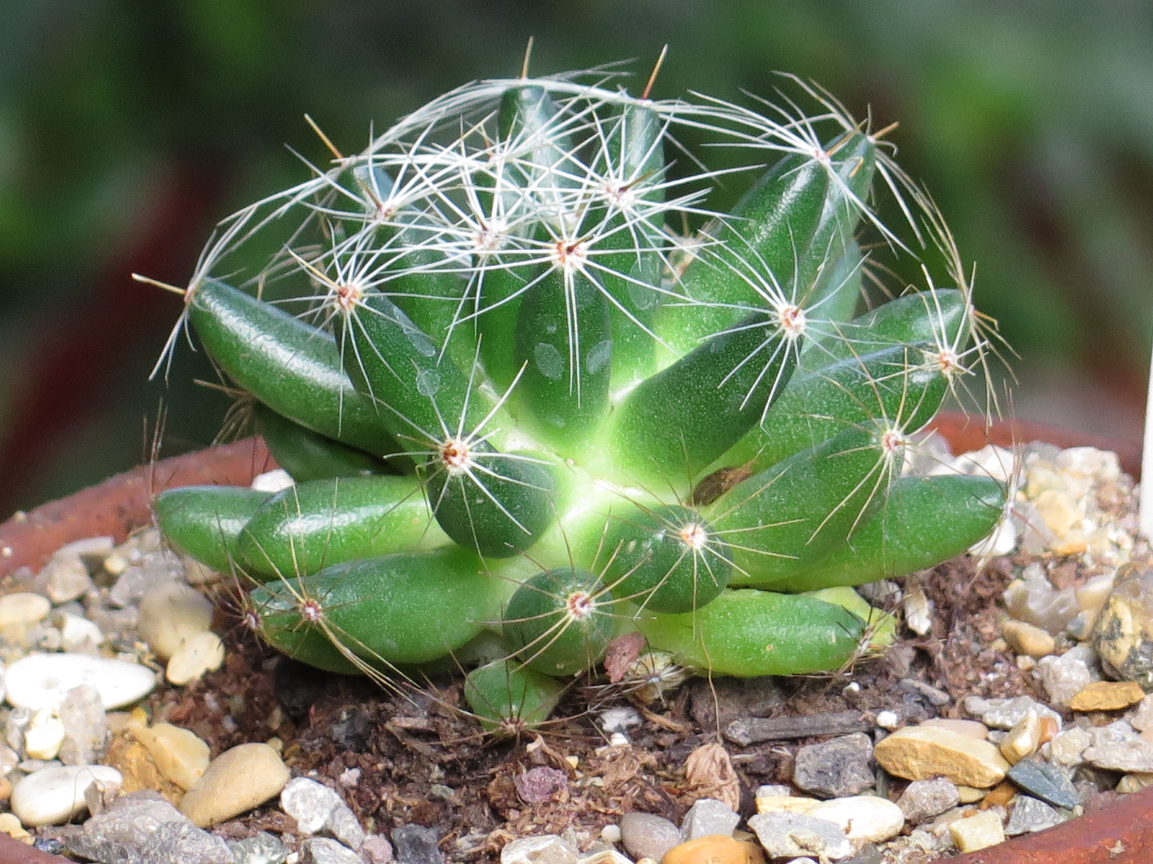 Mammillaria longimamma var. sphaerica